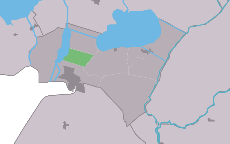 Kaartsje fan himrik fan Lemmer